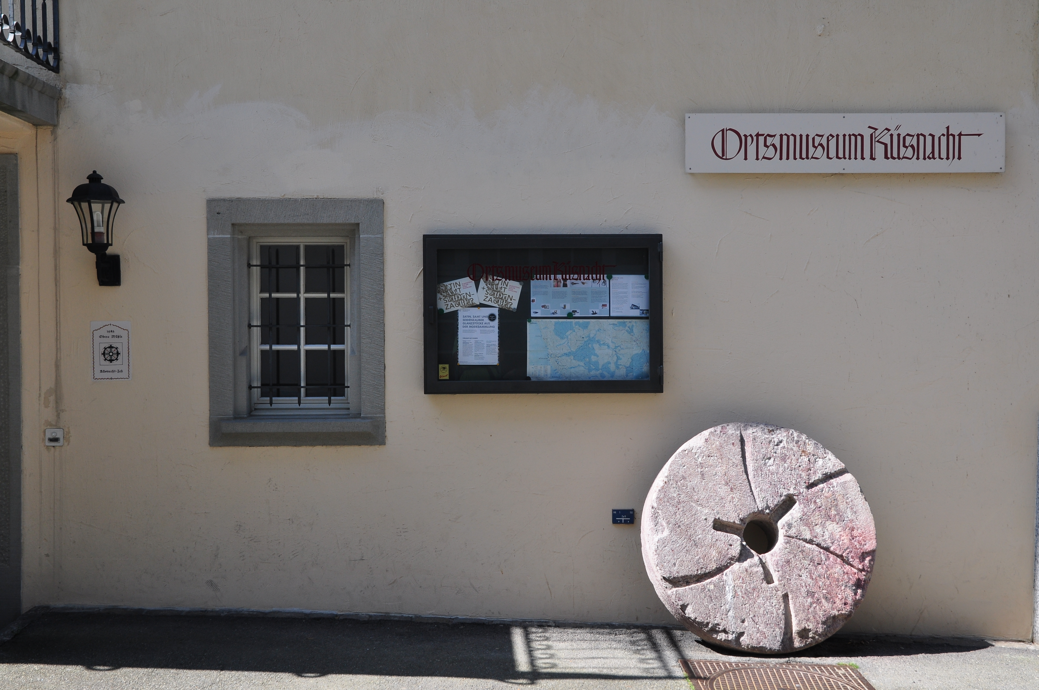 Ortsmuseum («Obere Mühle»), Tobelweg 1 in Küsnacht (Switzerland)